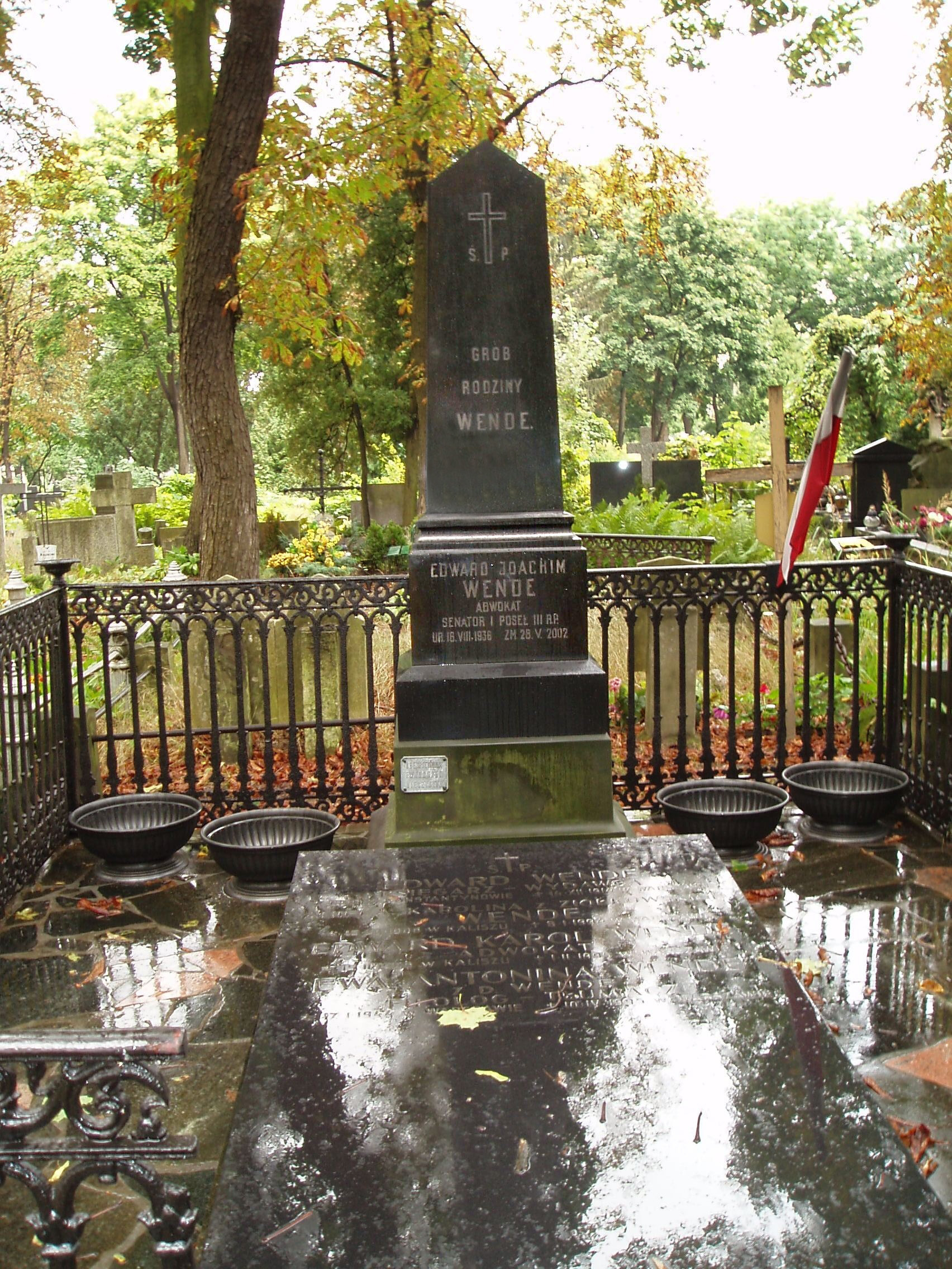 Groby rodziny Wende, cm. ewangelicki w Warszawie